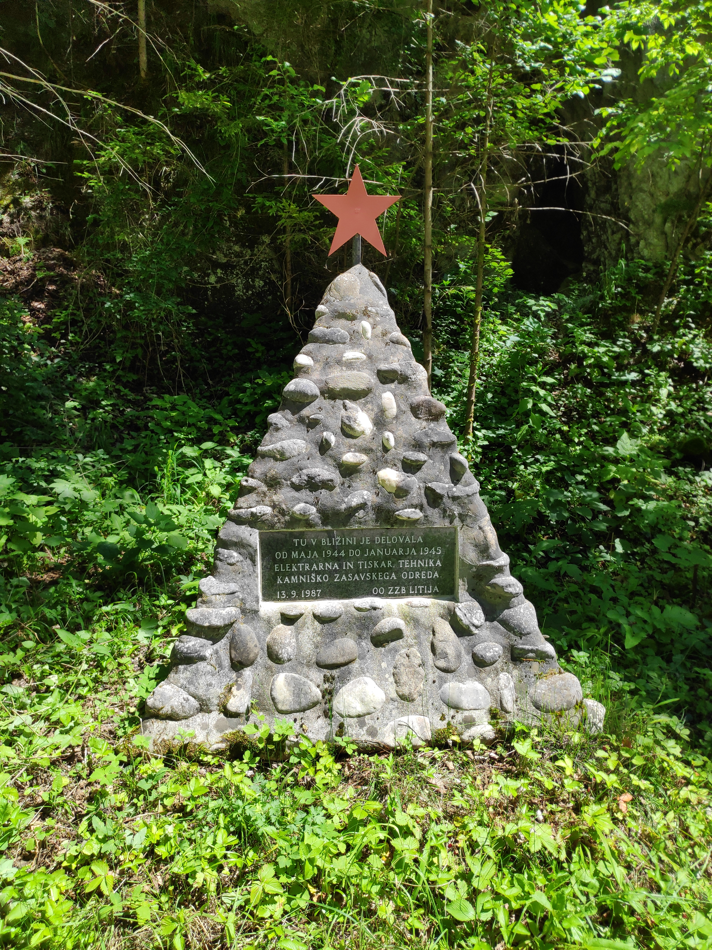 spomenik: tiskarna Kamniško-zasavski odred